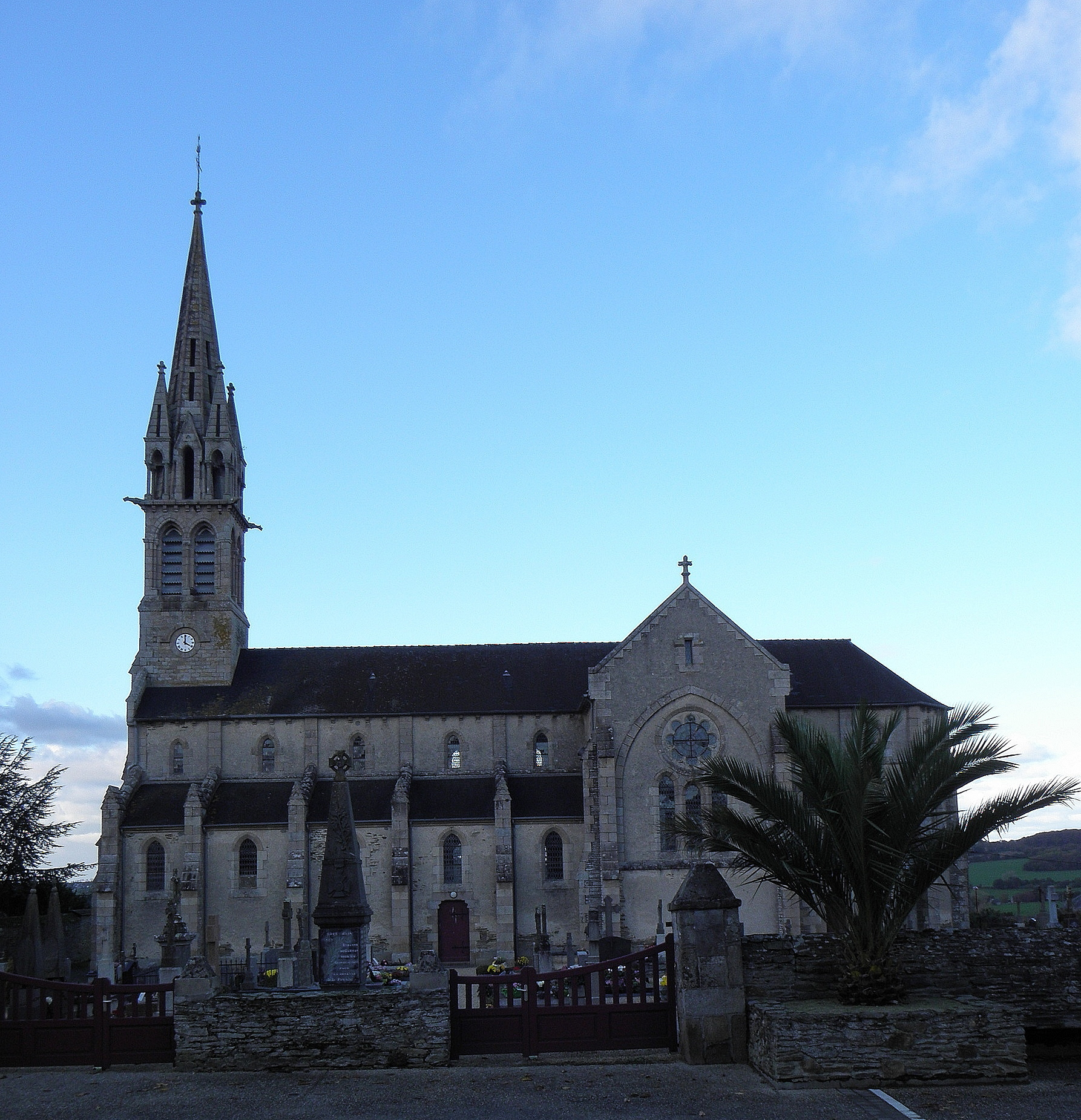 L'église de Garlan (29).